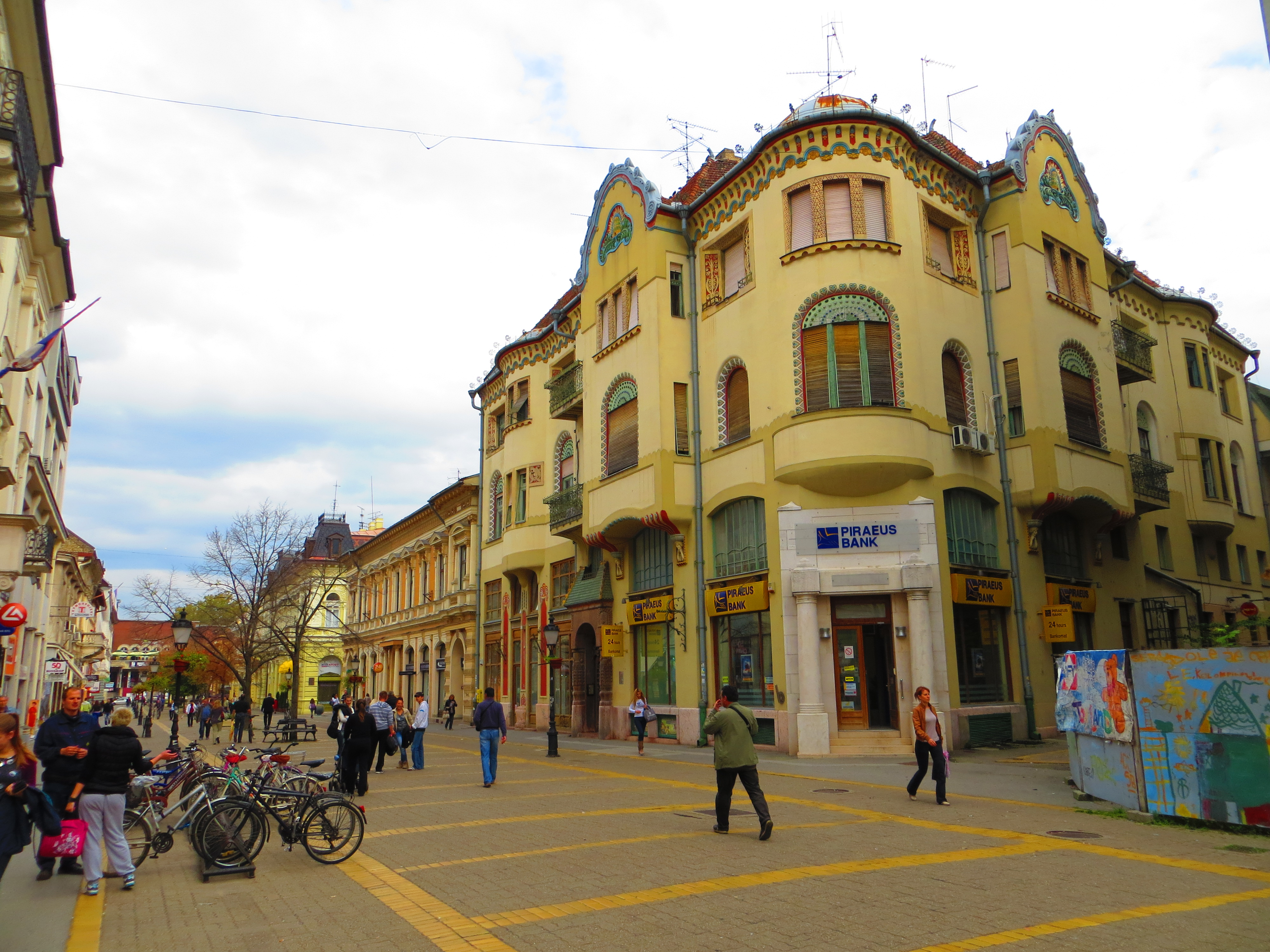 Centar I, Subotica, Serbia